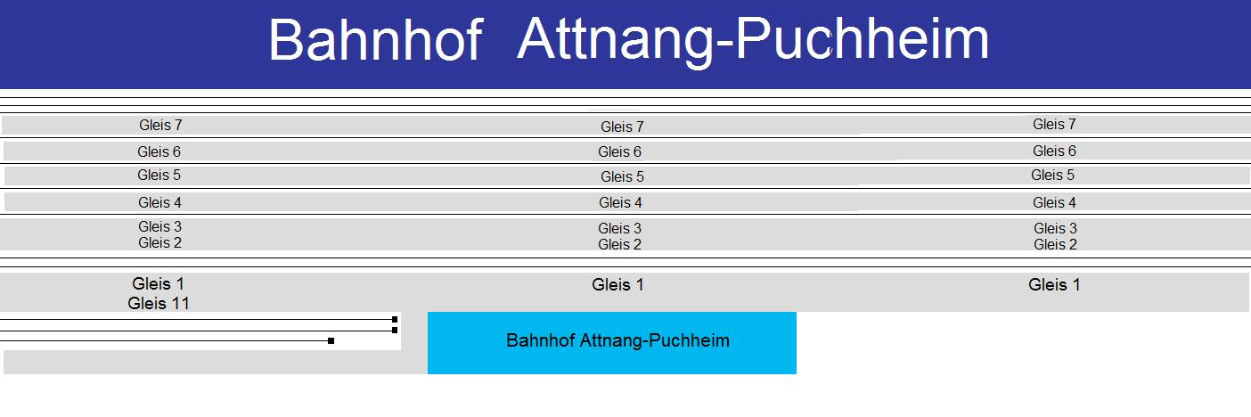 Gleisplan Bhf.Attnang-Puchheim vor Bahnhofsumbau